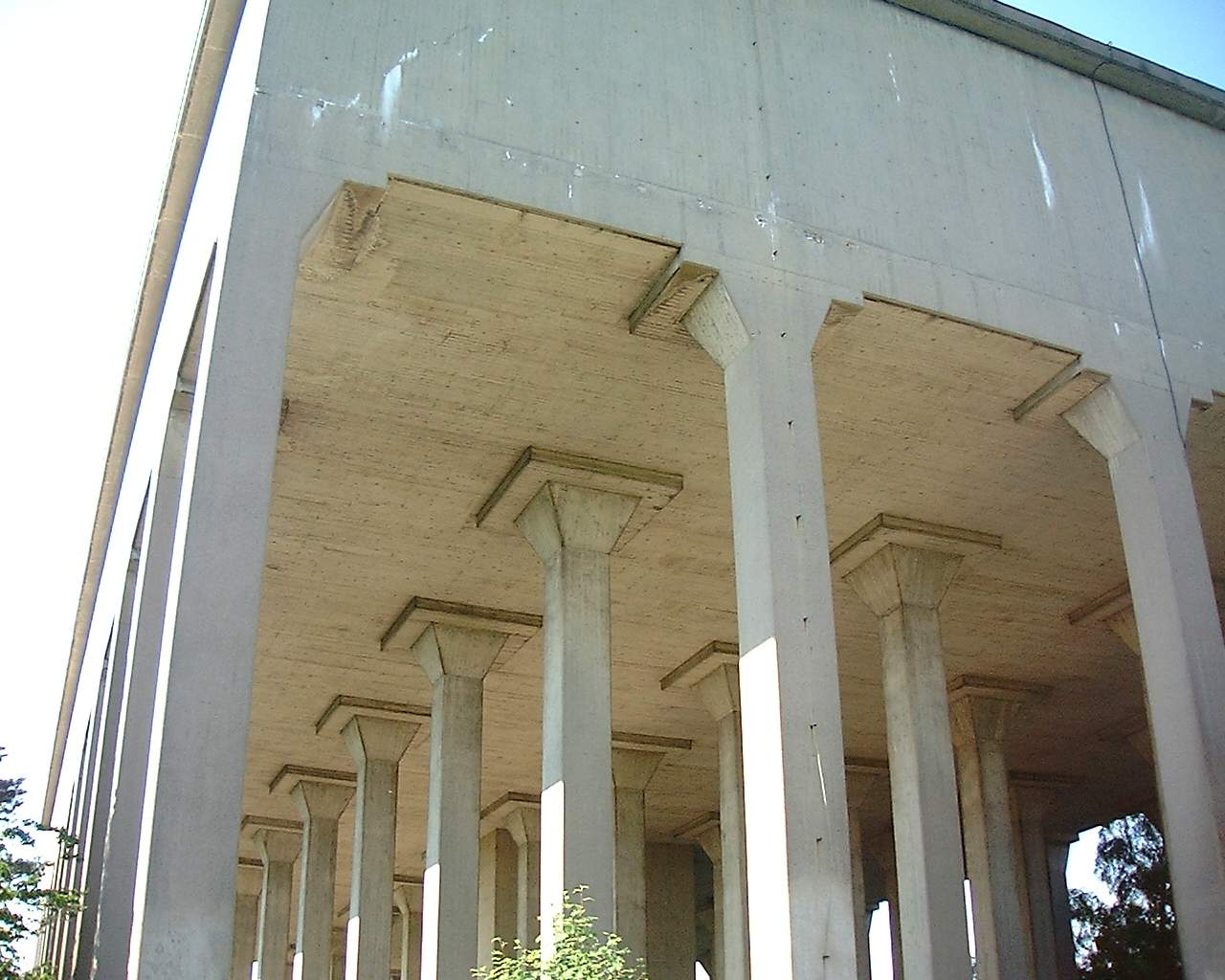 Uggleviksreservoaren, Djurgården, Stockholm, Sweden